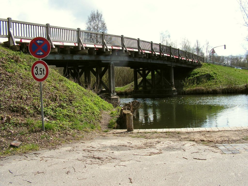 Wakenitz/Holzbrücke bei Rothenhusen